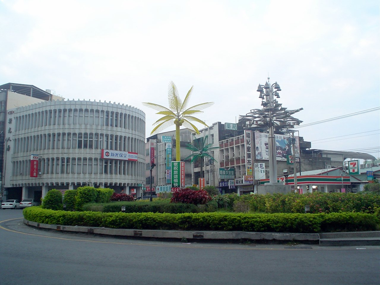 虎尾圓環